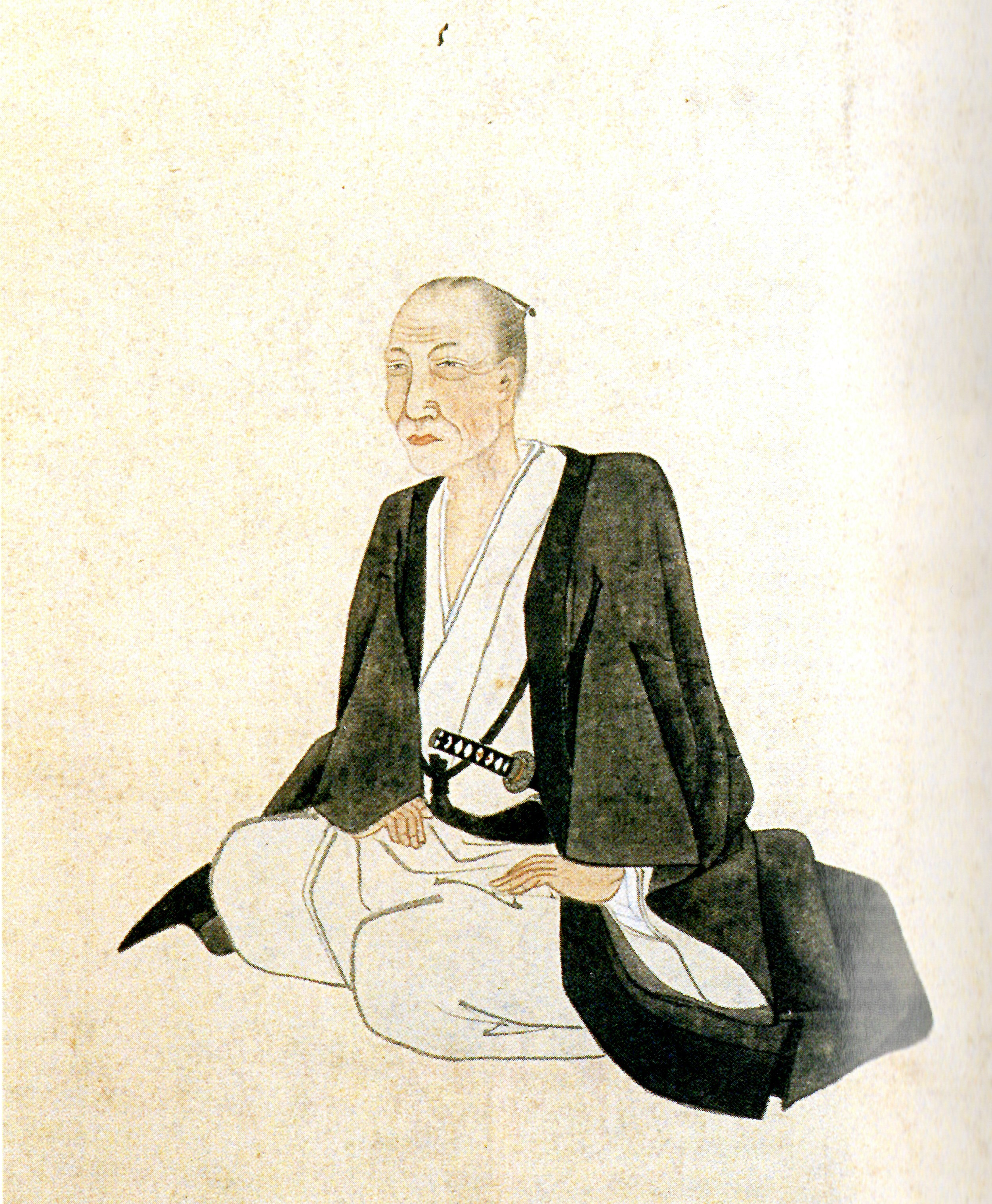 島津久倫の肖像。